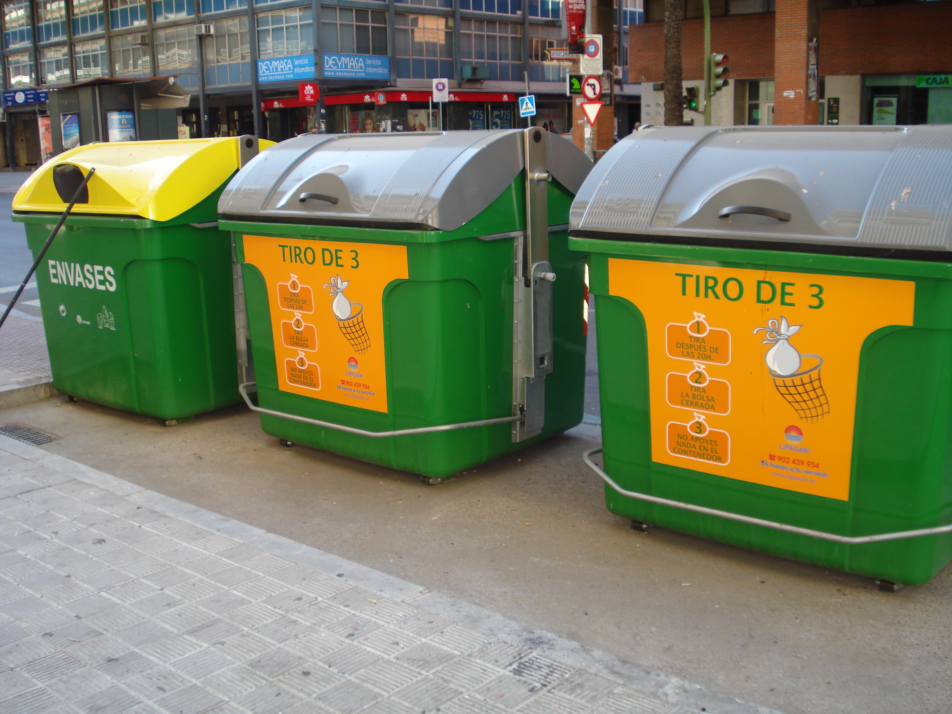 Contenedores de residuos urbanos de LIPASAM en Sevilla